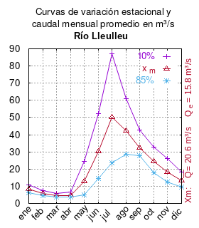 Curvas de variación estacional y promedio mensual del río Lleulleu. # Dirección General de Aguas, VIII Región # Estudio de Disponibilidad Cuenca del Río Laja, enero 2000 # Santiago de Chile # Ministerio de Obras Públicas (Chile) # url: # urlarchivo: # Tabla 2 Caudales promedio mensuales y Tabla 3 caudales 85 y 10, pág. 27 en el navegador pdf mes 10% x_m 85% ene 10.81 8.22 6.27 feb 7.4 5.73 4.42 mar 5.72 4.48 3.54 abr 6.8 4.49 3.63 may 24.36 12.9 5.16 jun 52.4 30.4 14.47 jul 87.19 50.3 23.66 ago 60.83 42.20 28.48 sep 42.67 32.5 27.72 oct 32.93 24.3 17.75 nov 26.31 18.3 12.37 dic 18.35 13.2 9.4 This plot was created with Gnuplot.